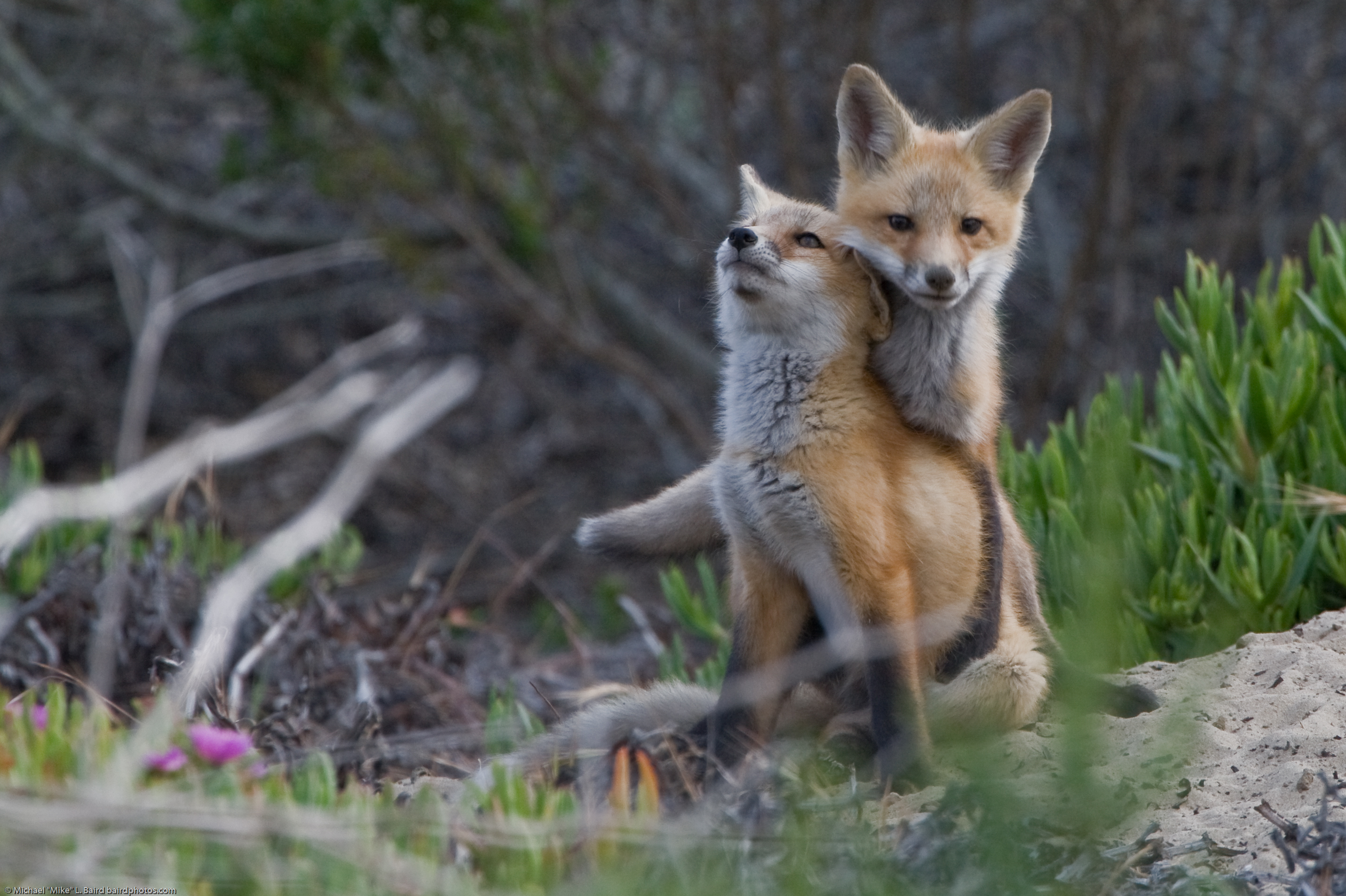 Deux renardeaux en plein jeu